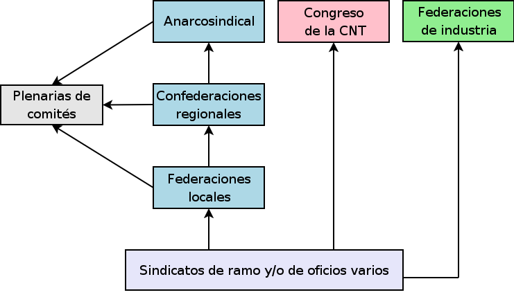 Esquema de la estructura organizativa de la CNT